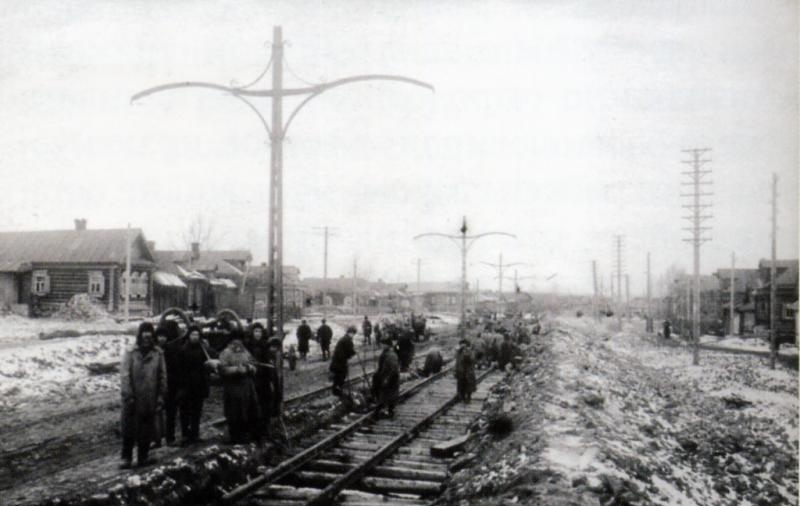 Укладка рельсов трамвайной Даниловской линии через деревню Нижние Котлы, 1925 год.